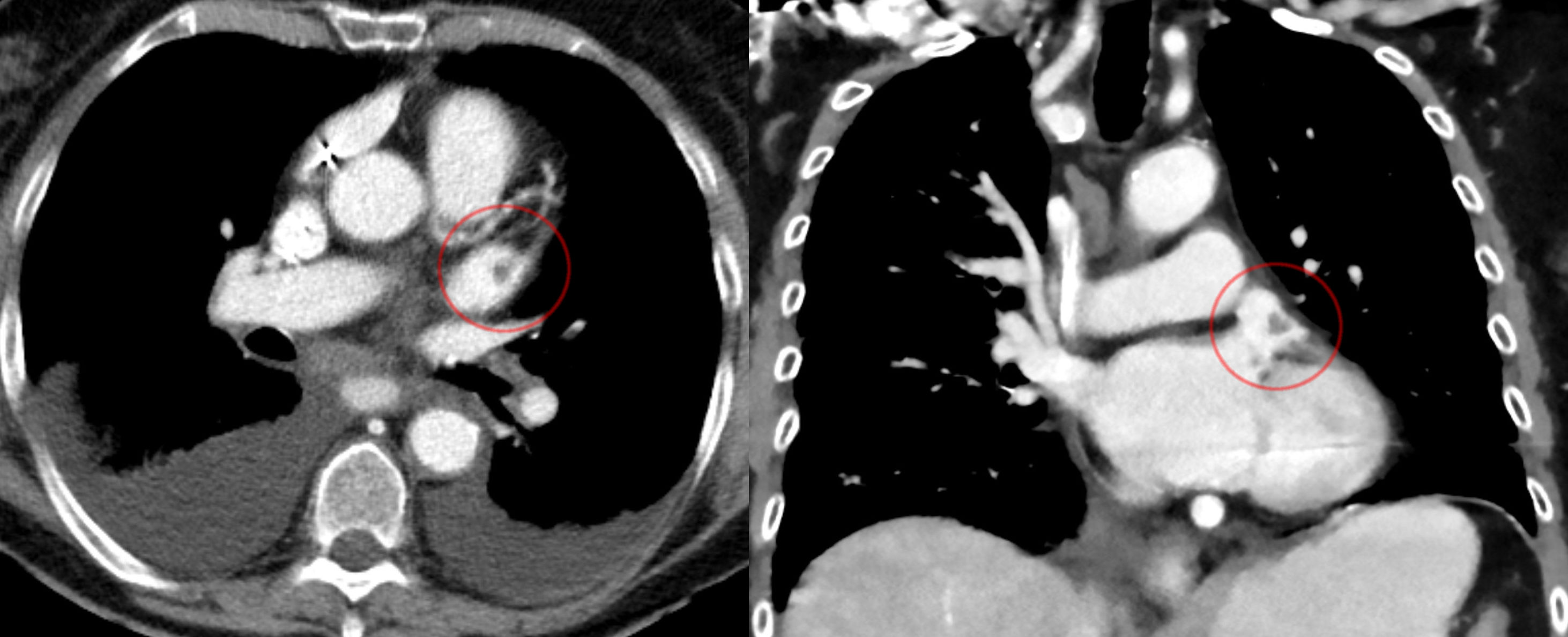 Zufallsbefund eines Thrombus im linken Herzohr bei einer 92-jährigen in der Computertomographie. Links axial, rechts koronar.